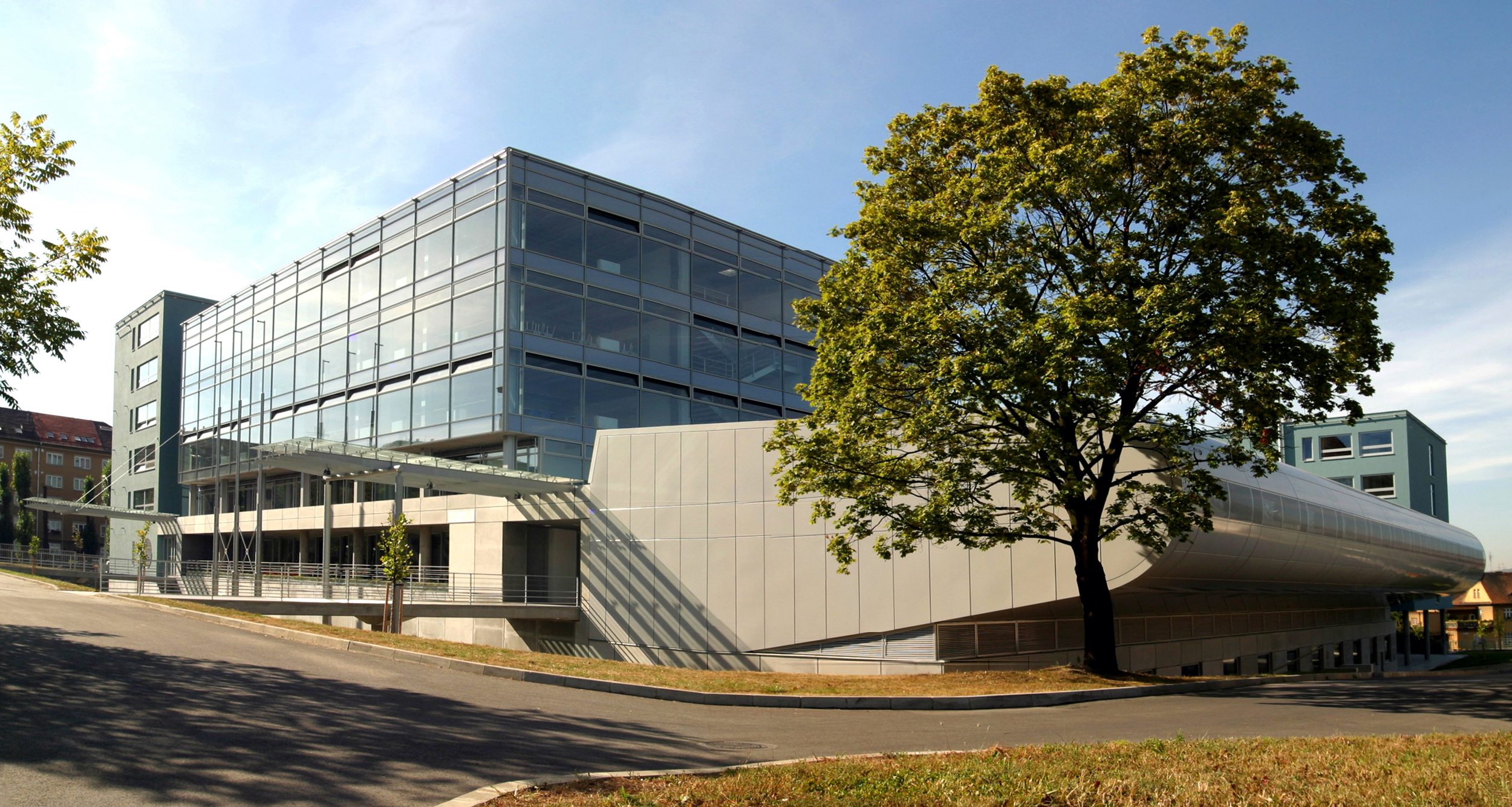 Pohled na pavilon PEF MENDELU.